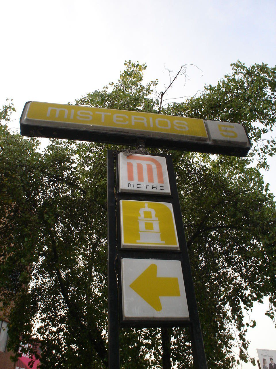 ESTACION MISTERIOS